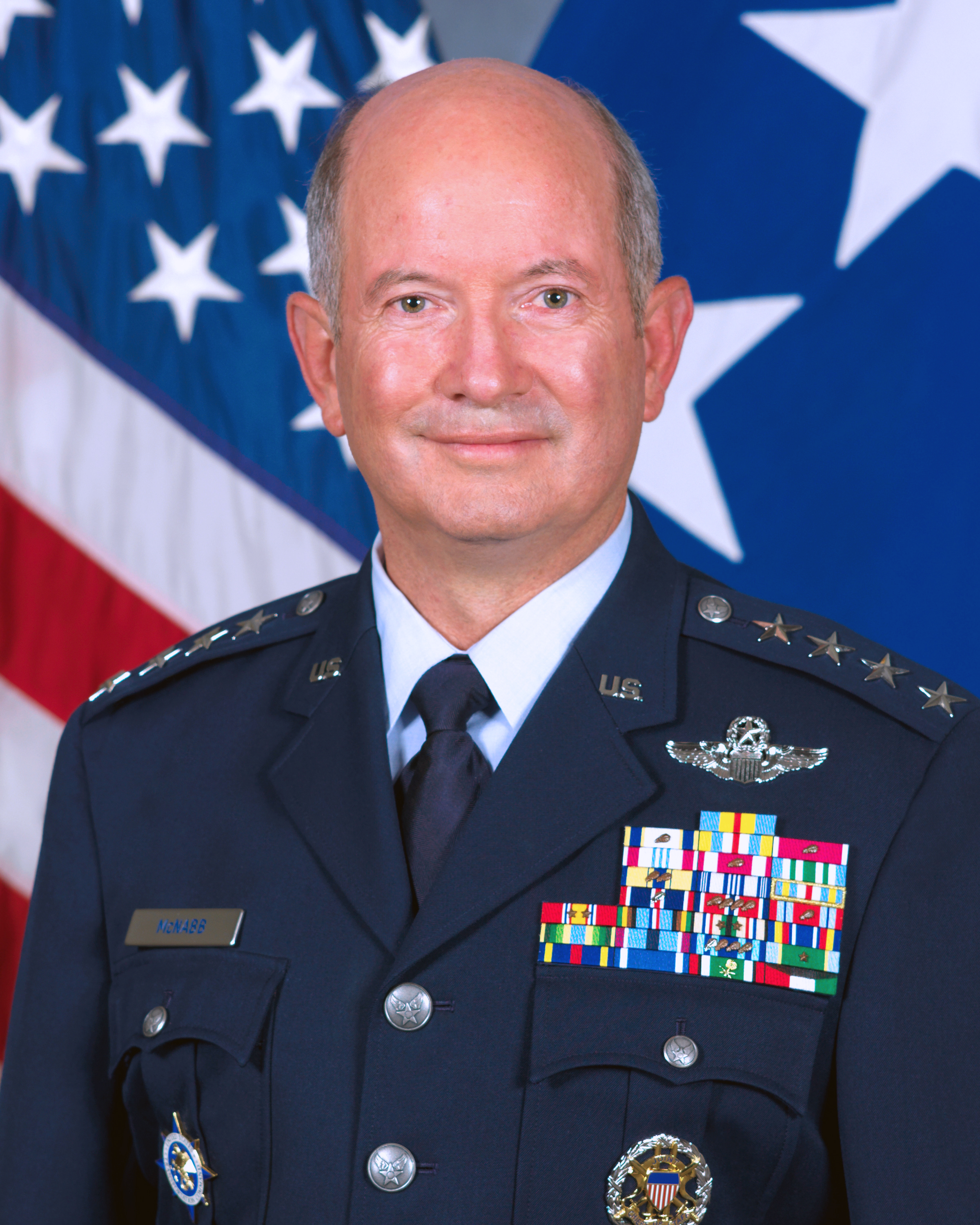 Commander, USTRANSCOM